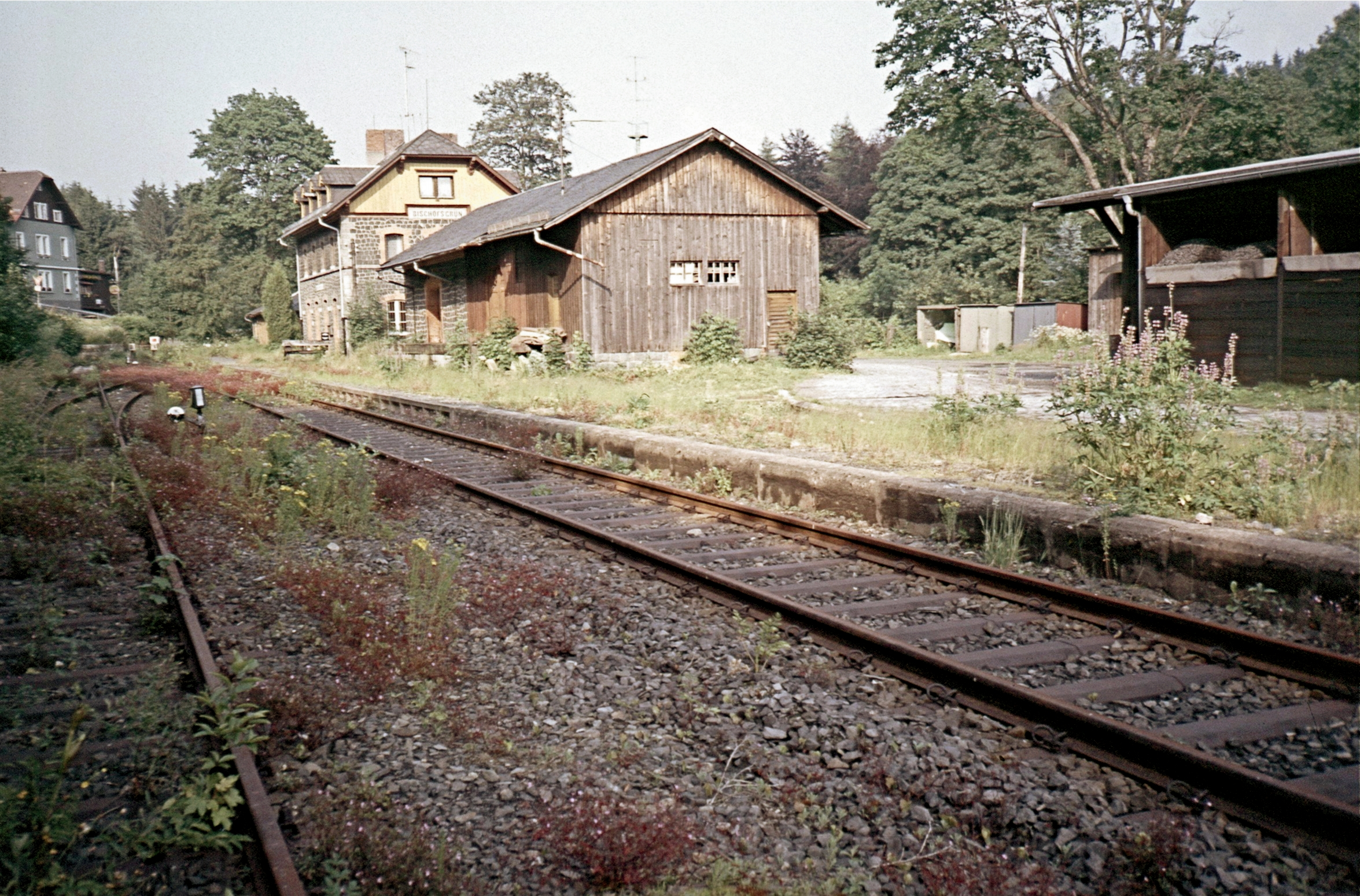 Bahbhof Bischofsgrün (Scan von Dia)